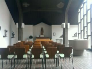 Marienaltar und Taufbecken